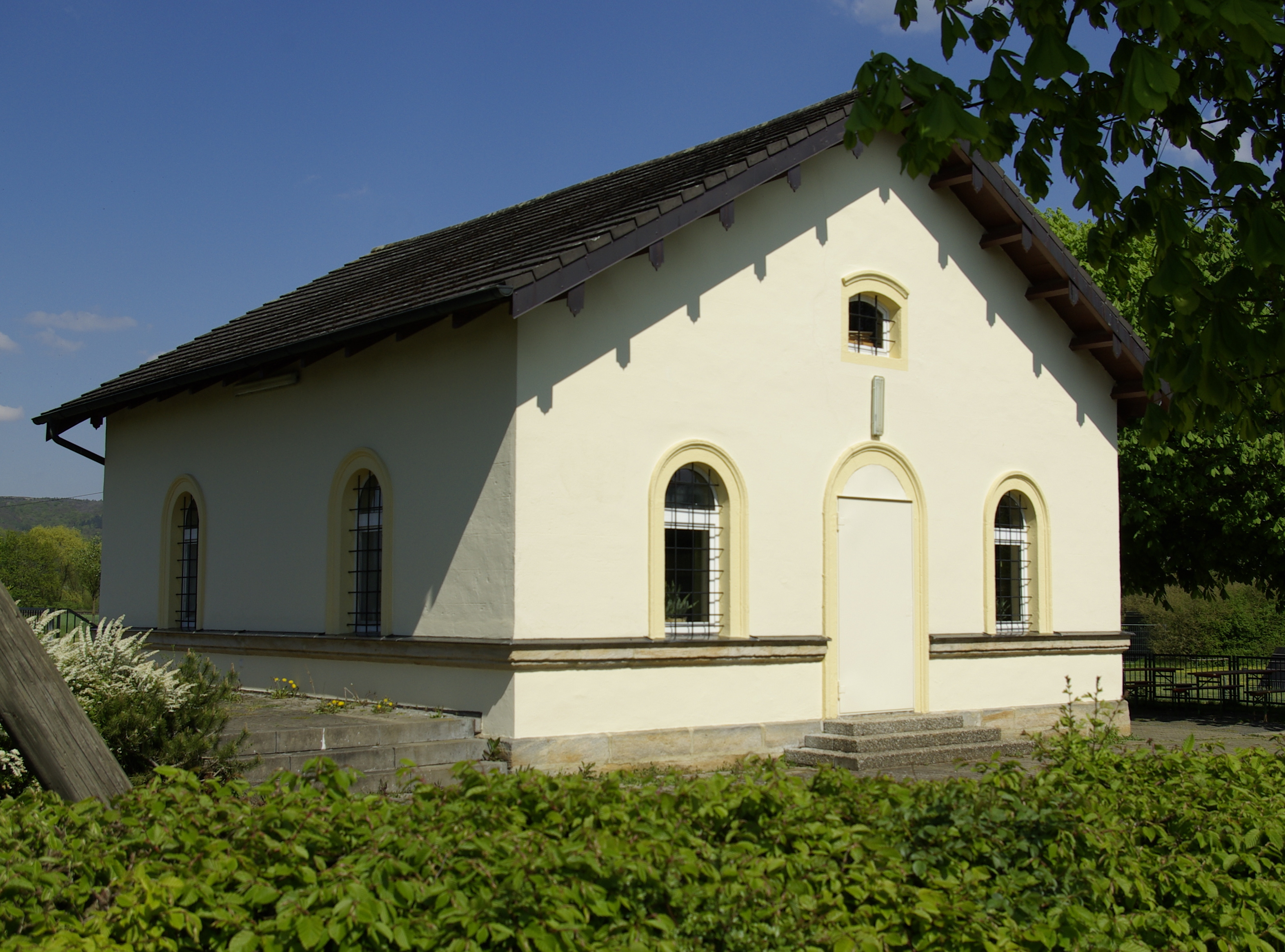 Das erhaltene Schleusenwärterhaus der Schleuse 96 des Ludwig-Donau-Main-Kanals in Hirschaid. Die Trasse des 1836 bis 1846 erbauten und 1950 aufgelassenen Ludwigskanals wurde in diesem Abschnitt in den 1960er Jahren abgetragen und mit dem Main-Donau-Kanal überbaut.